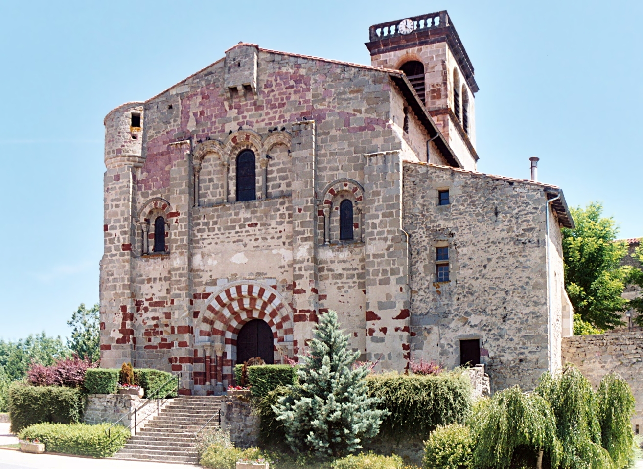 France - Auvergne - Église Saint-Didier de Saint-Dier-d'Auvergne